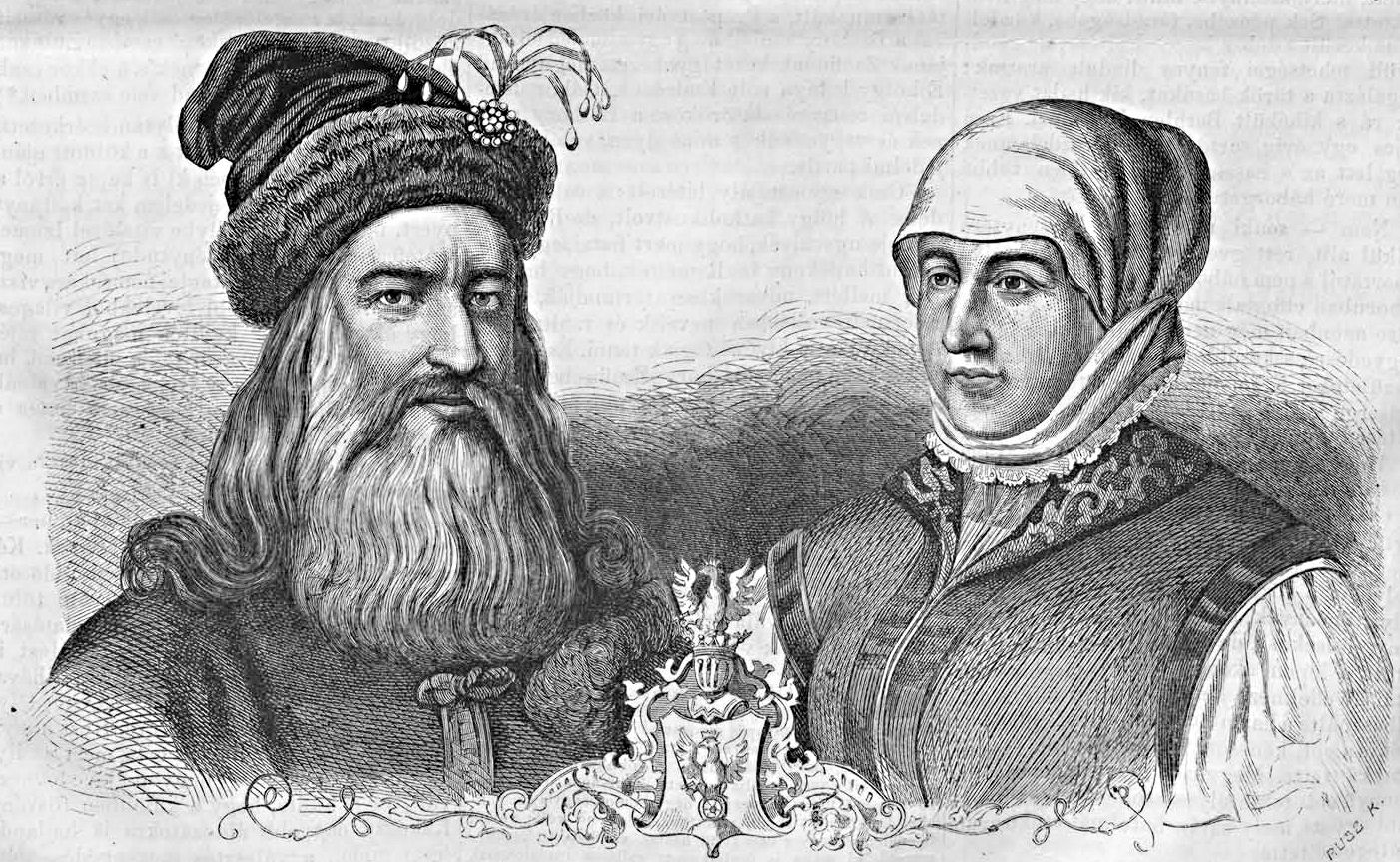 I. Rákóczi György (1593–1648) erdélyi fejedelem (1630–1648) és felesége, Lorántffy Zsuzsanna (1600–1660). Rusz Károly metszete (Vasárnapi Ujság, 1867. szeptember 15.)